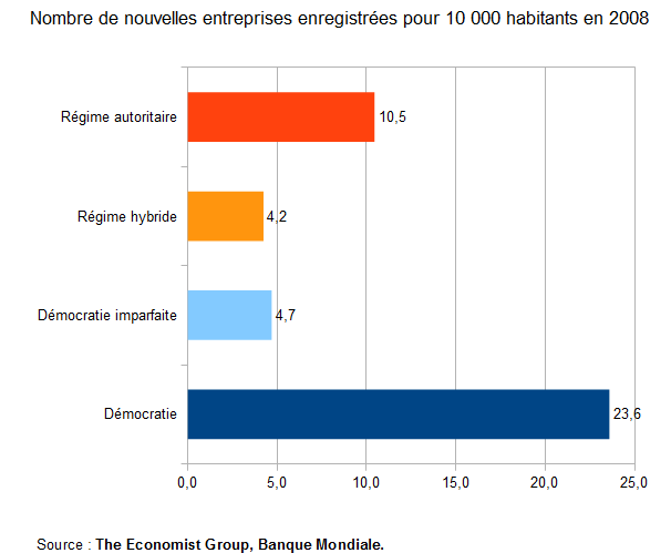 Nombre de création de nouvelles entreprises en fonction du régime politique en 2008 - Source: The Economist Group, Banque Mondiale